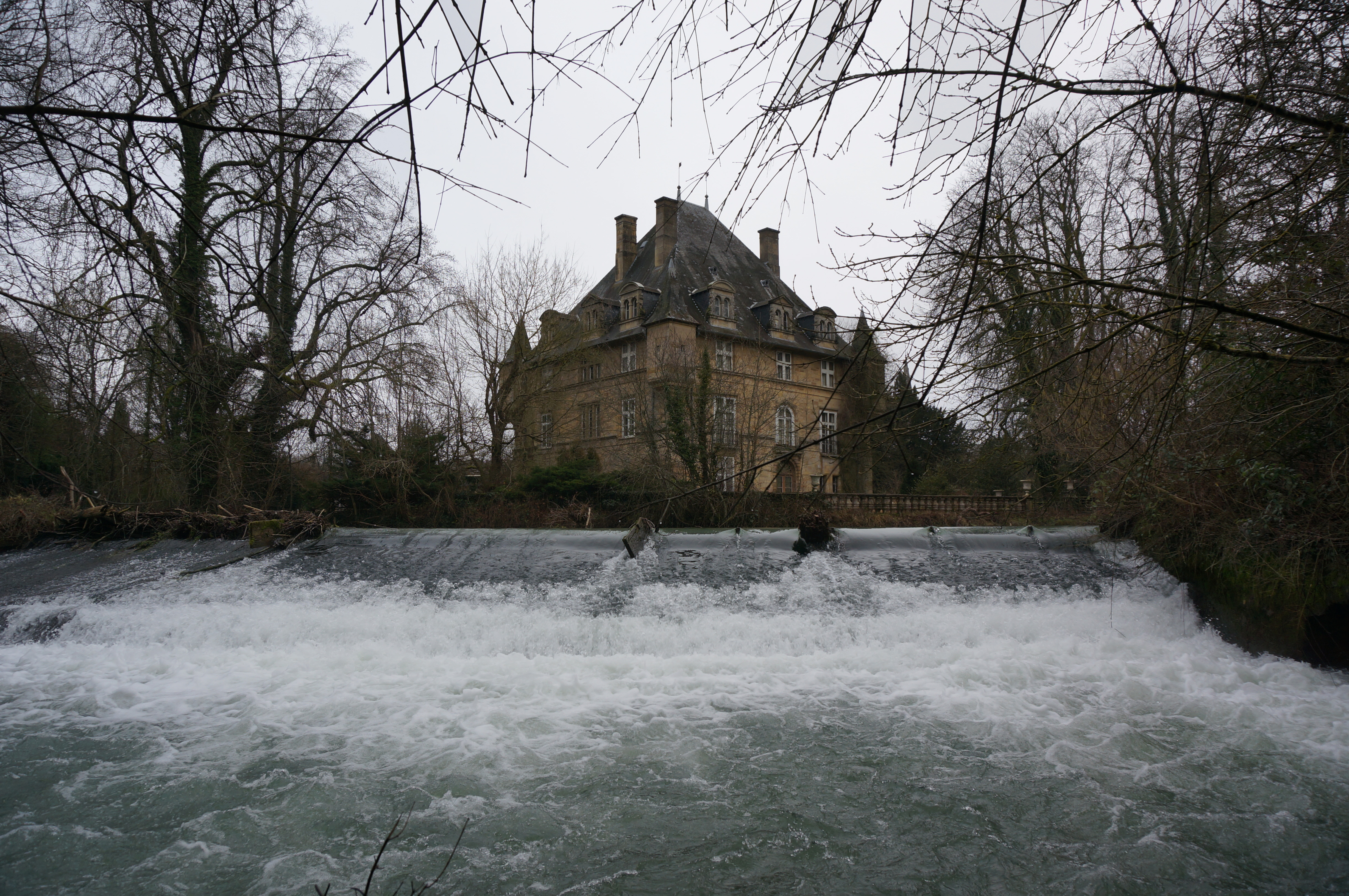 vues à Ville-sur-Saulx.